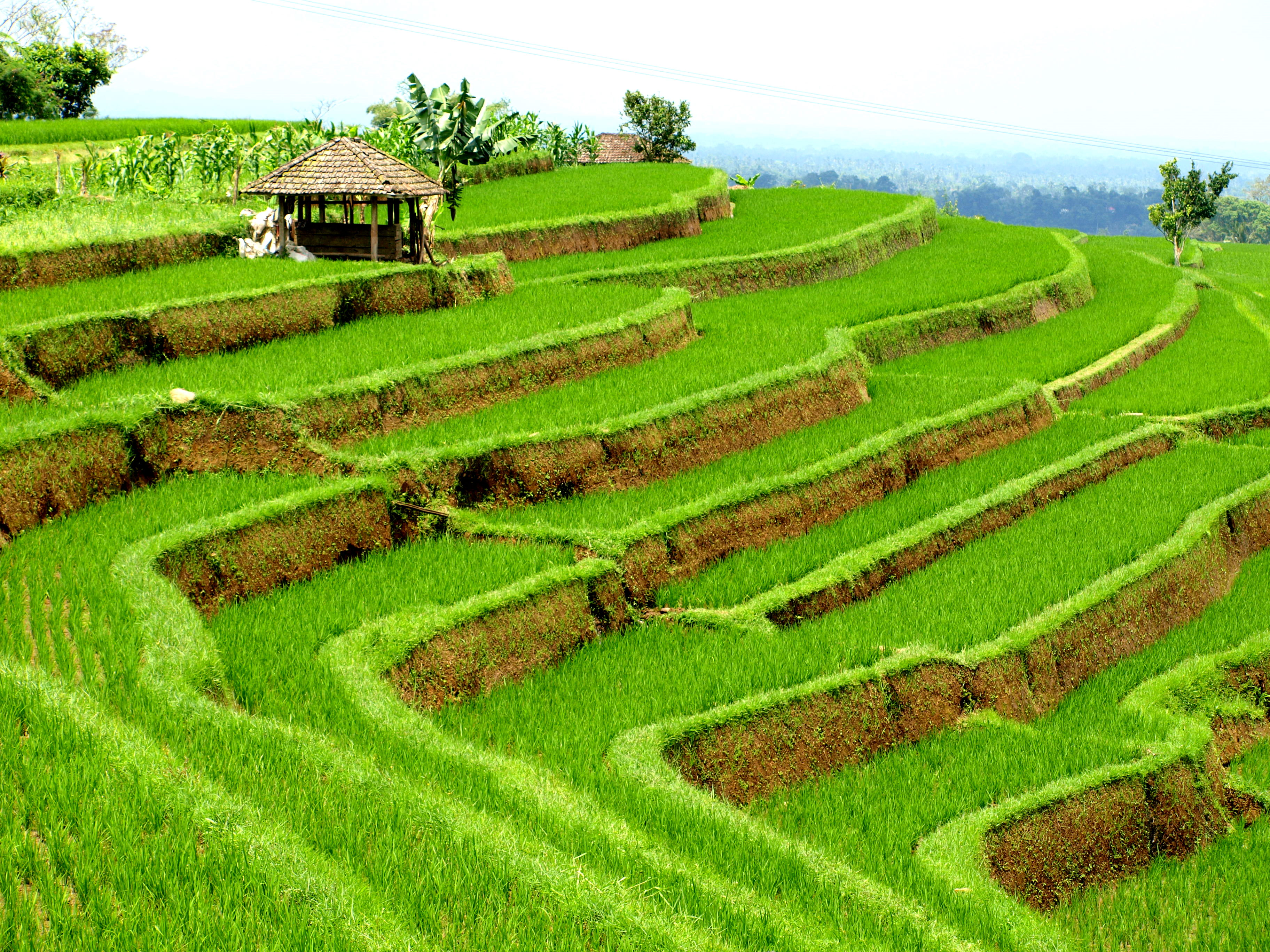 Bali